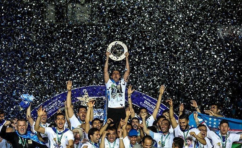 قهرمانی استقلال در فینال جام حذفی